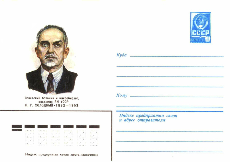 Художественные маркированные конверты 1982 года.